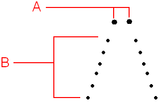 Morso di una vipera